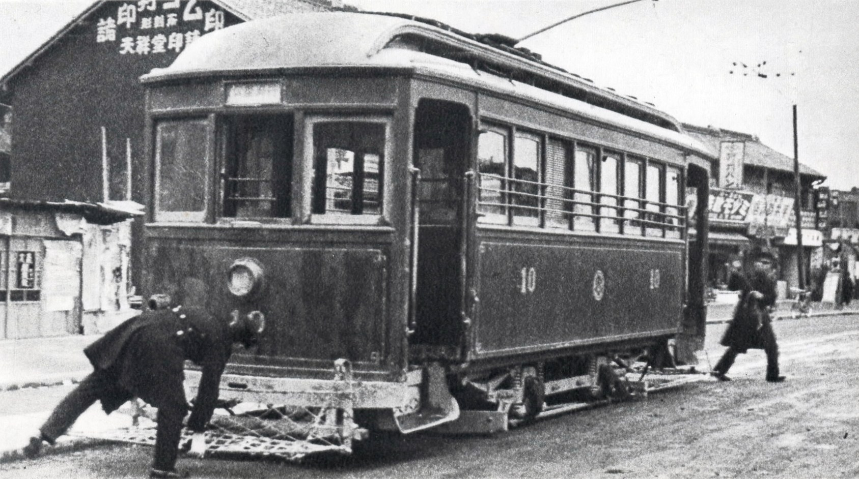 中村電気軌道線の明治橋終点（現、中村警察署付近）